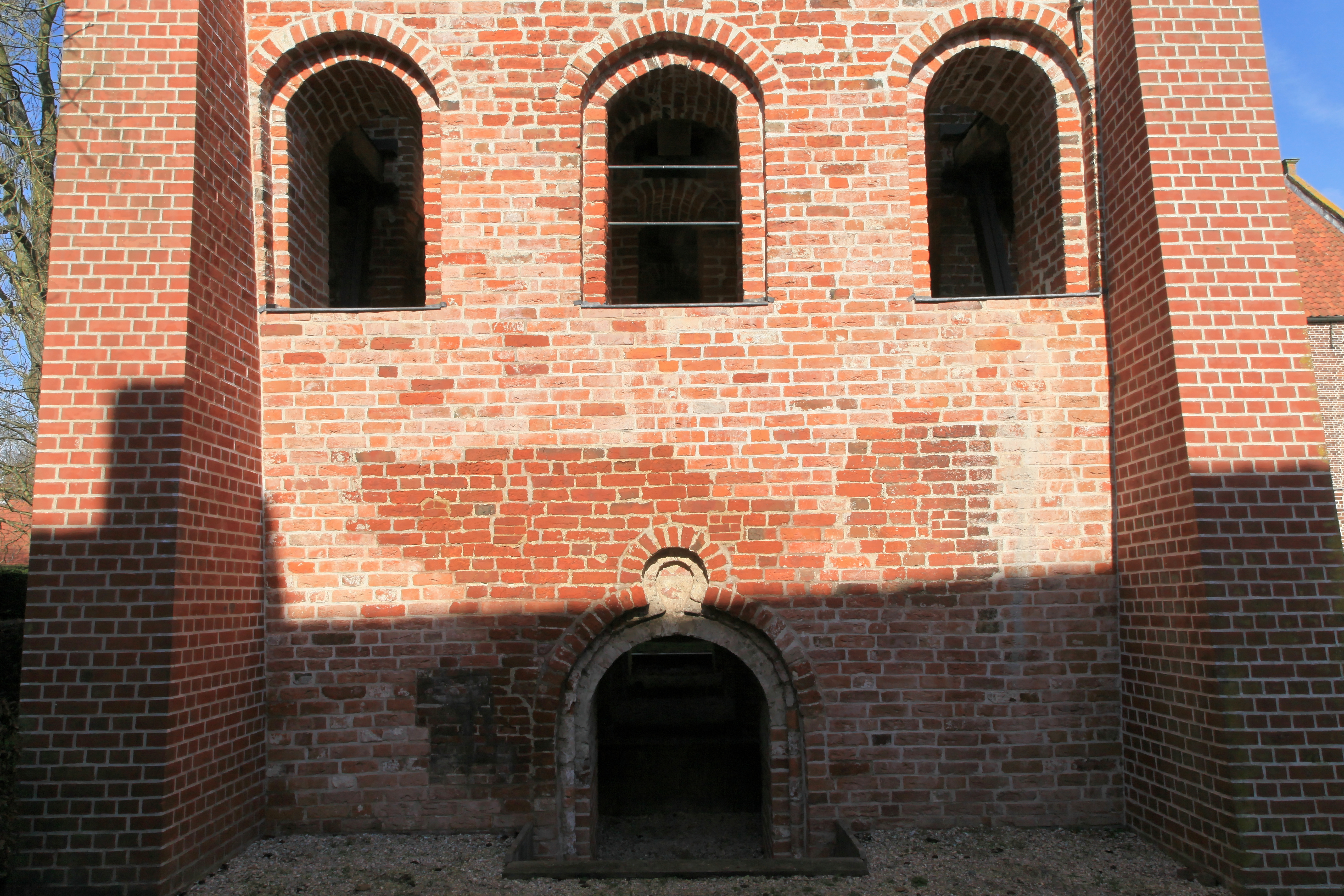 Glockenturm, Denkmalstraße in Midlum, Jemgum